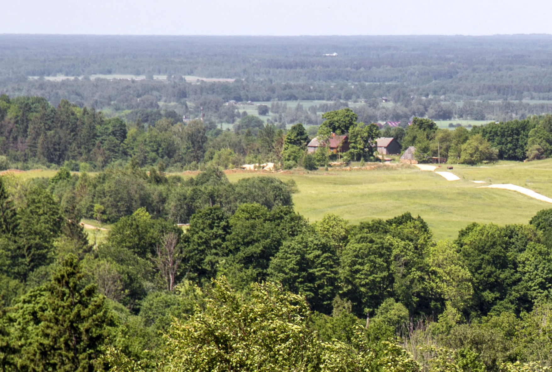 Kamparkalnā